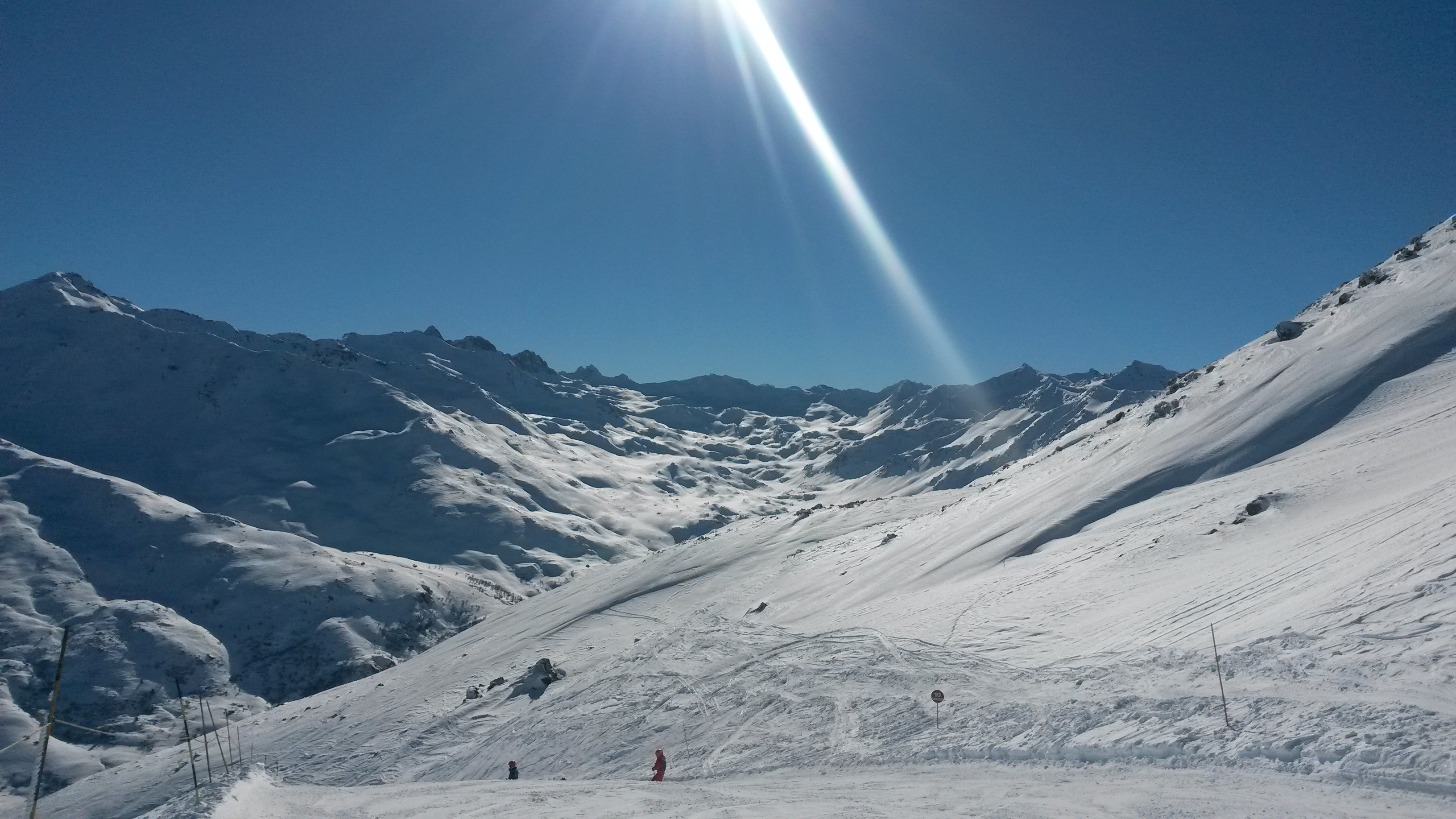 Le fond de la vallée de la Neuvache à Valmeinier.